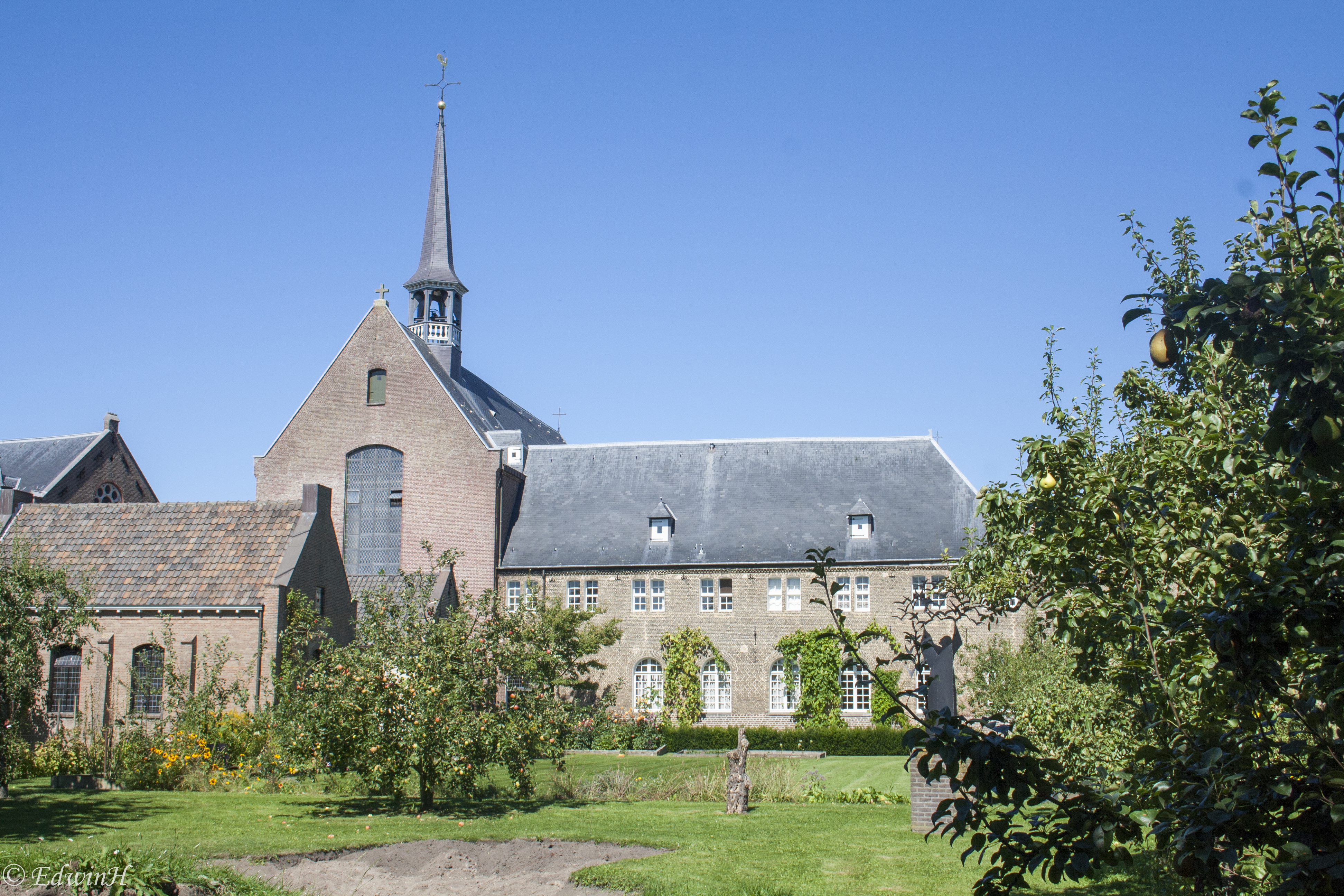 Boomgaard en kapel - Franciscanenklooster Megen